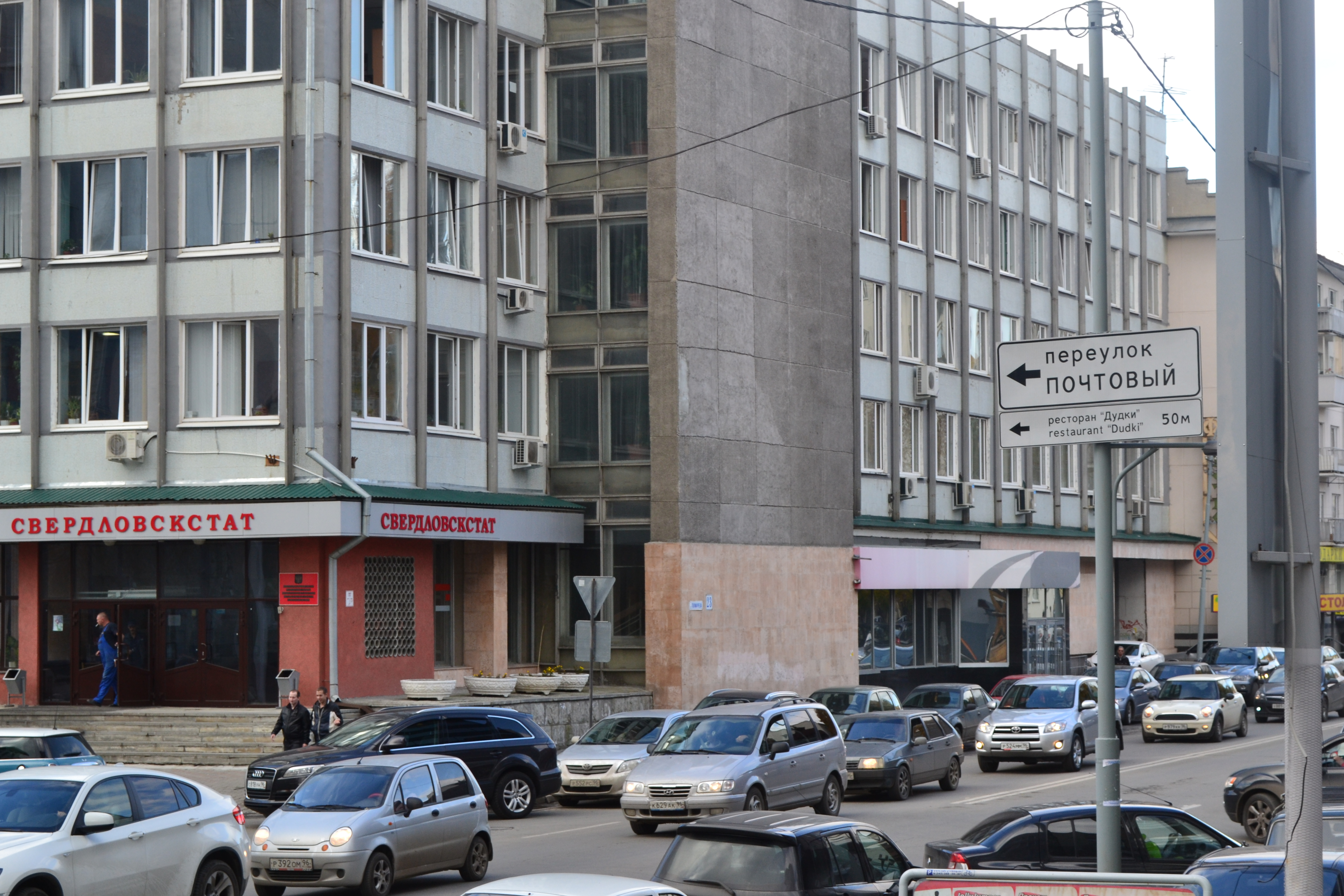 Переулок Почтовый, Екатеринбург.